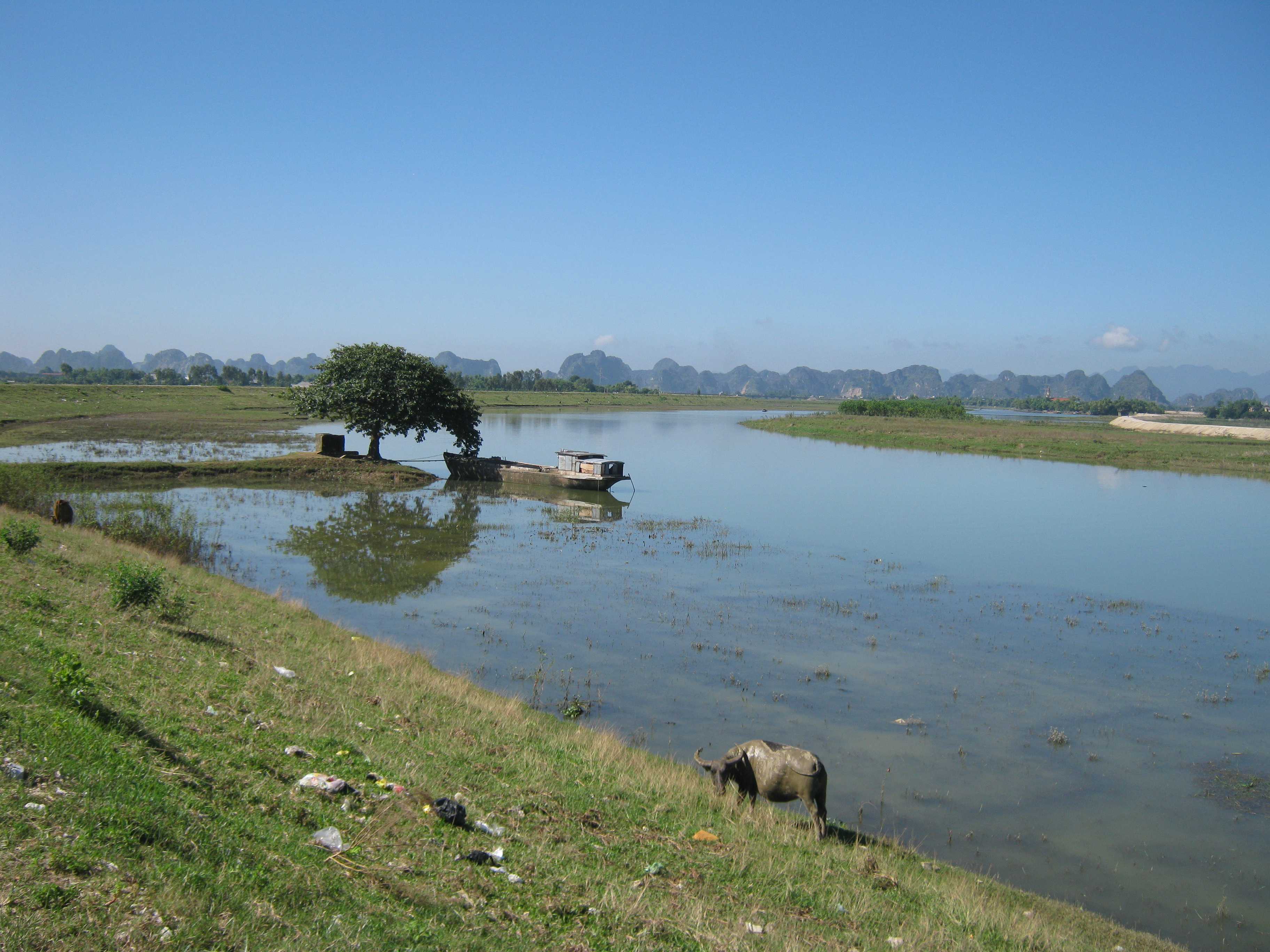 Khu di tích động Hoa Lư, châu Đại Hoàng, Ninh Bình